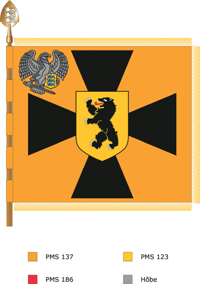 Kaitseliidu Pärnumaa maleva lipp